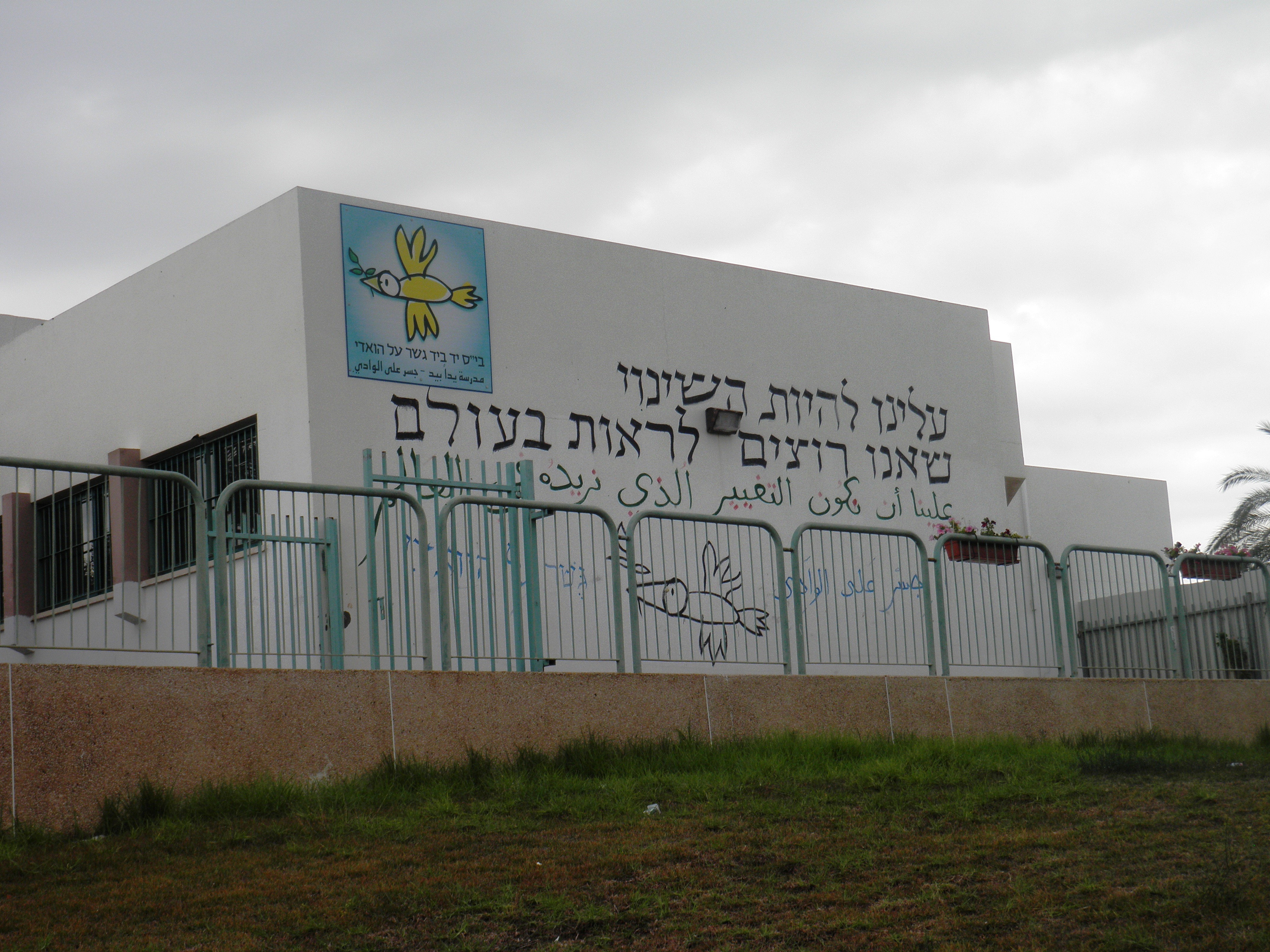 מפגש ויקיפדיה